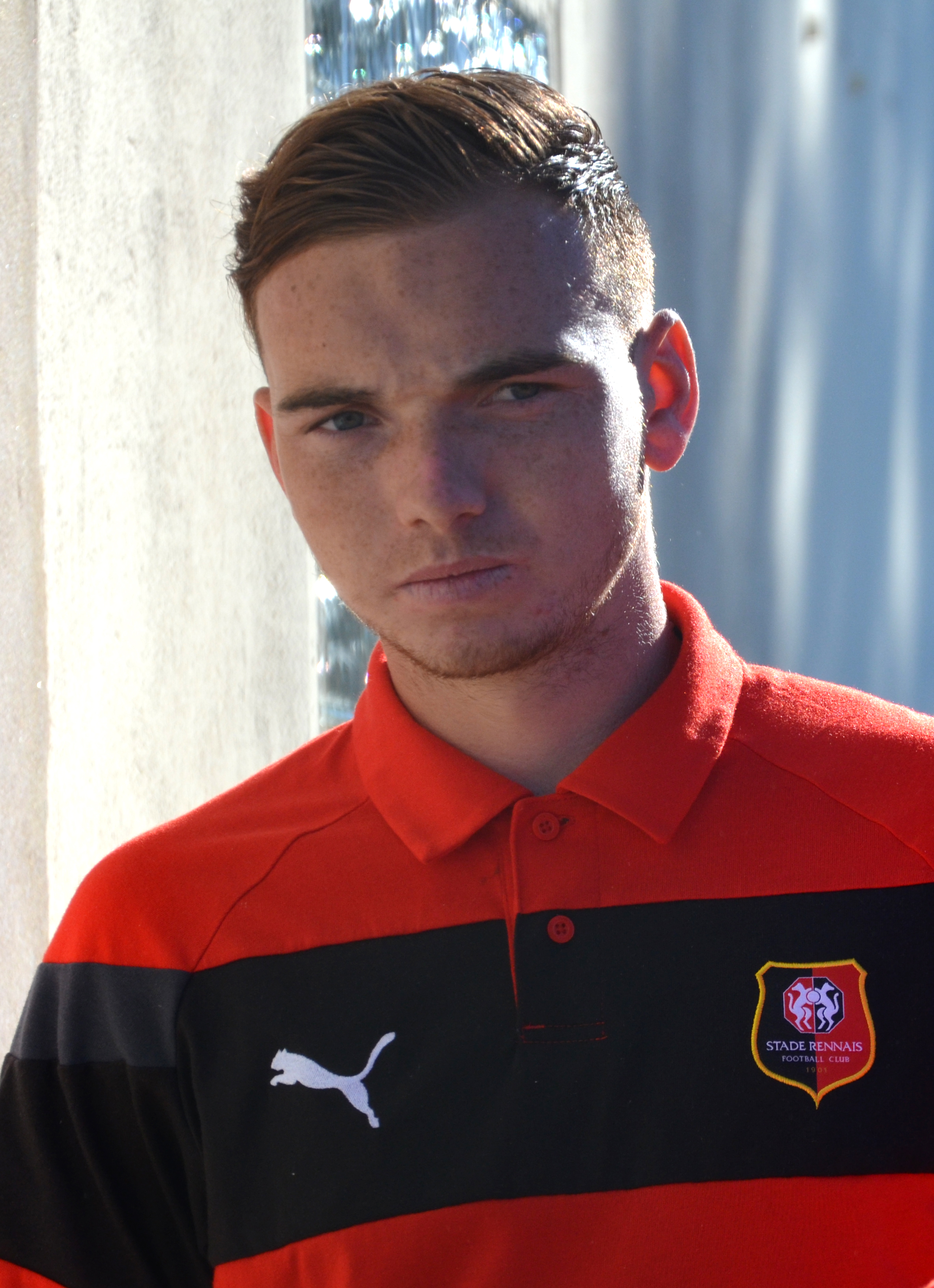 Photographie prise lors du match opposant le Stade rennais à l'USM Alger en match amical au stade Paul-Audrin de Dinard le 16 juillet 2016. Ici, Nicolas Janvier.